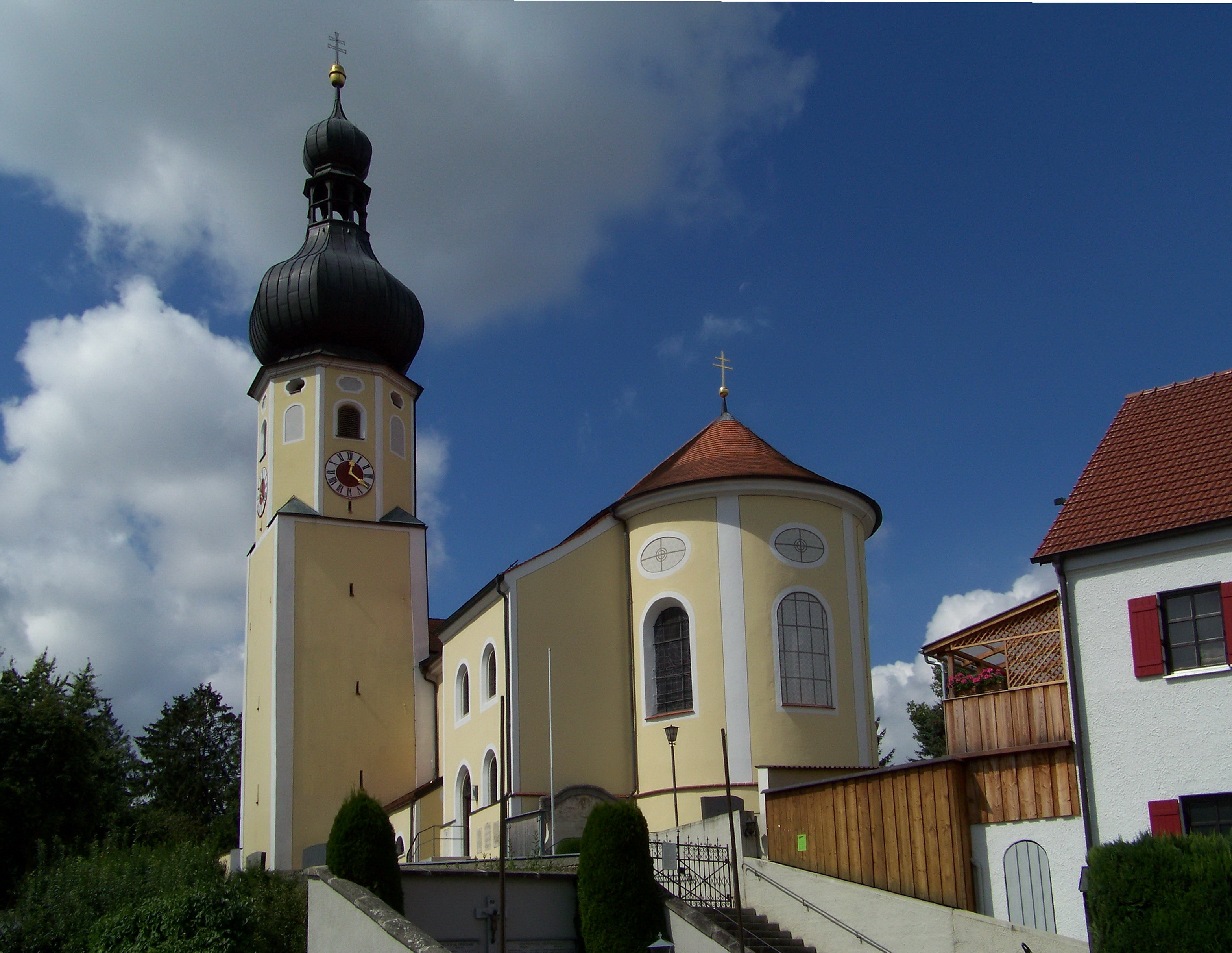 Oberviehbach, Kirchweg 7. Kath. Pfarrkirche St. Georg, barocke Saalkirche mit eingezogenem Chor und Südturm, neu erbaut 1709; mit Ausstattung.